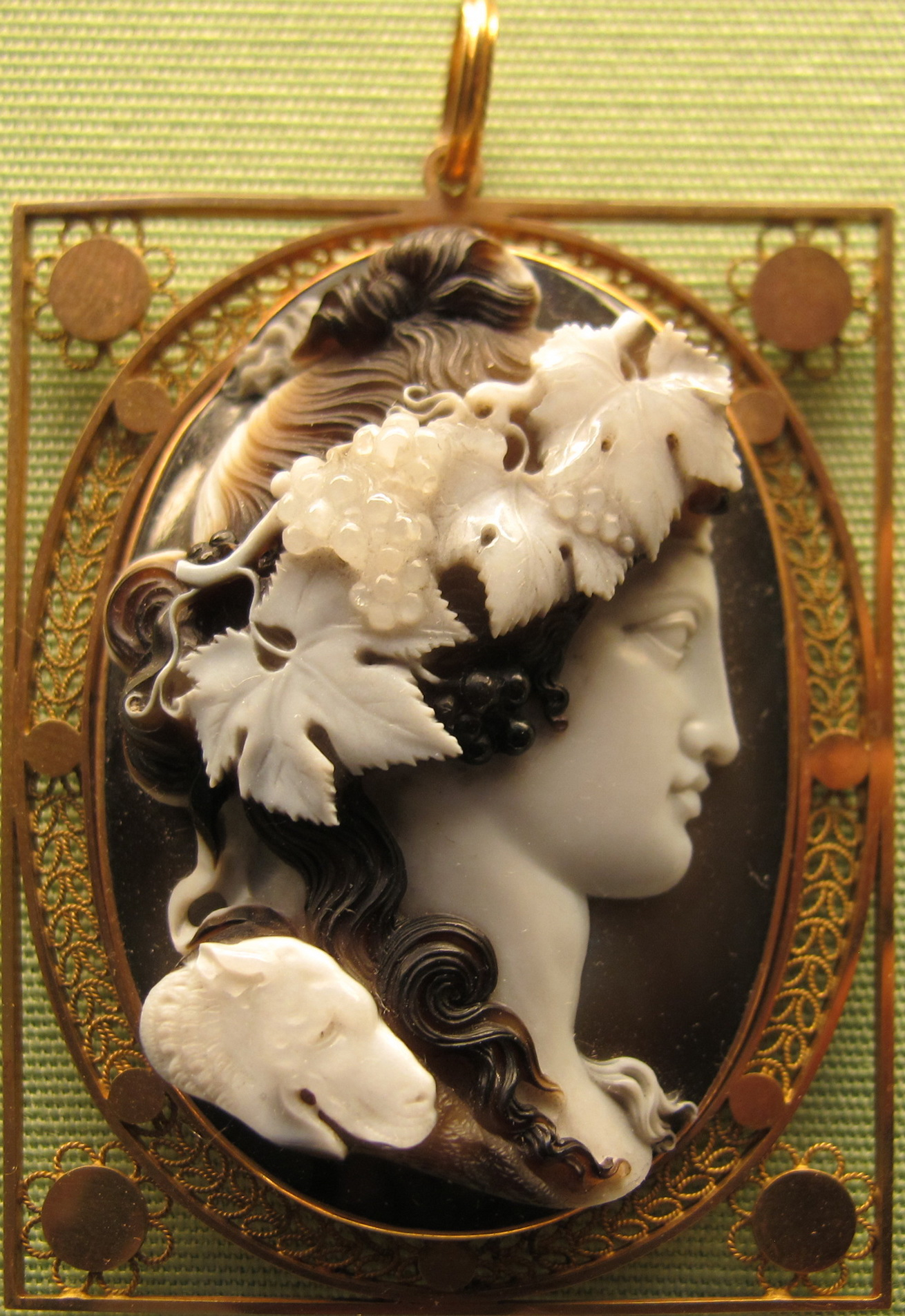 Benedetto pistrucci, bacco, sardonice, 1800 ca